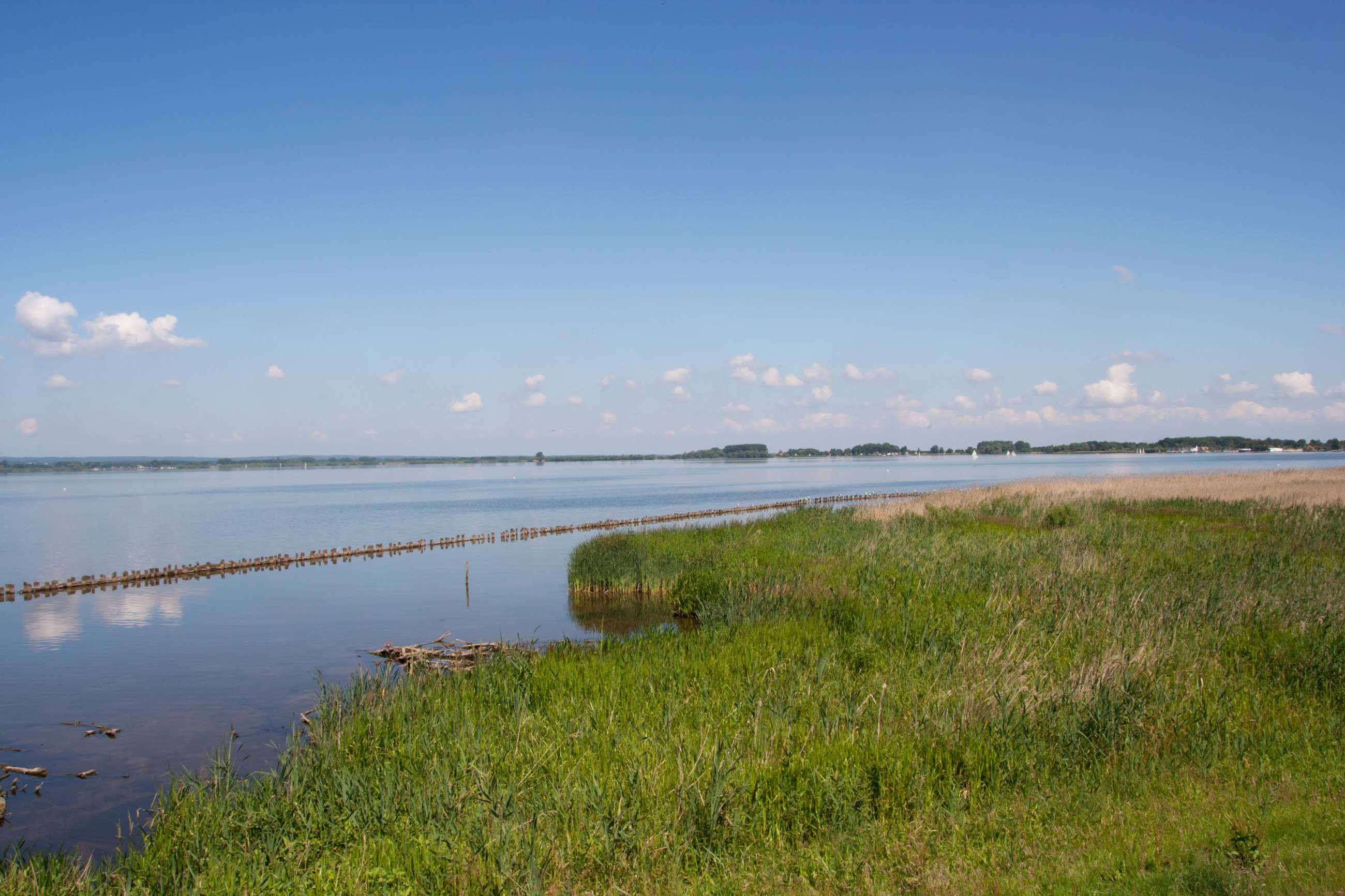 Blick von der "Hohen Sieben" Richtung Lembruch und Eicköpen. Die Pfahlreihe wurde zum Schutz des Schilfgürtels vor Wellenschlag gesetz.